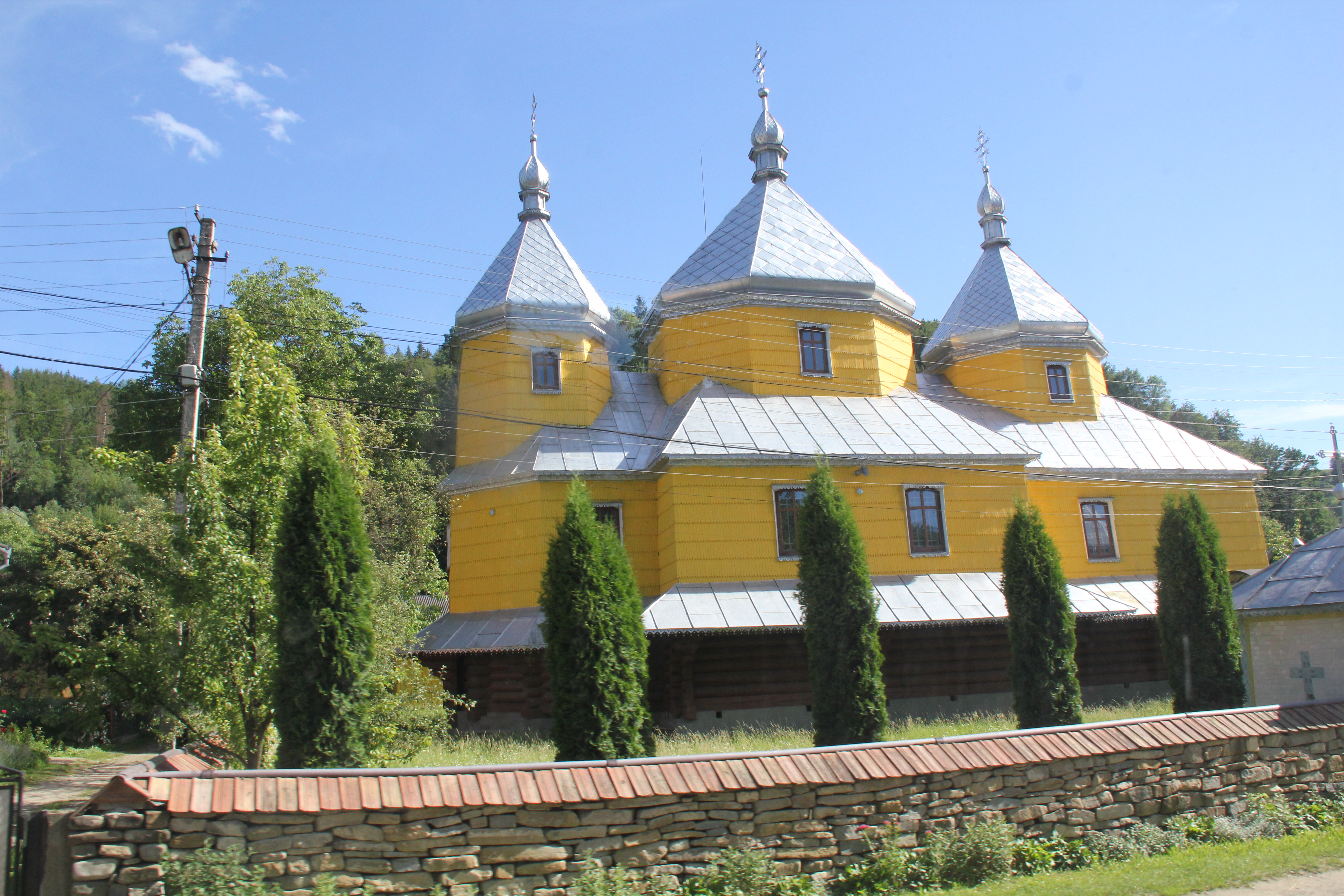 Успенська церква, с. Розтоки